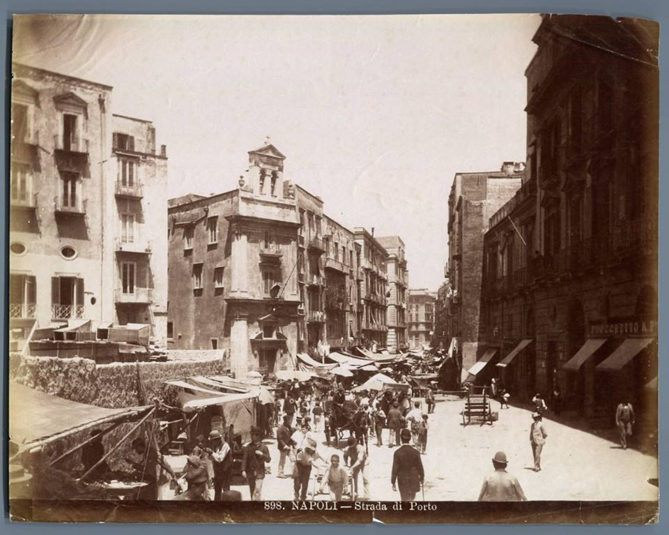 "Napoli - Strada di Porto" con la chiesa di santa Maria di Monserrato (distrutta). Autore sconosciuto (Achille Mauri? Roberto Rive?). Catalogo n° 898. La Strada di Porto fu distrutta ed allargata coi lavori del Risanamento, e corrisponde all'odierno tracciato di via Depretis.